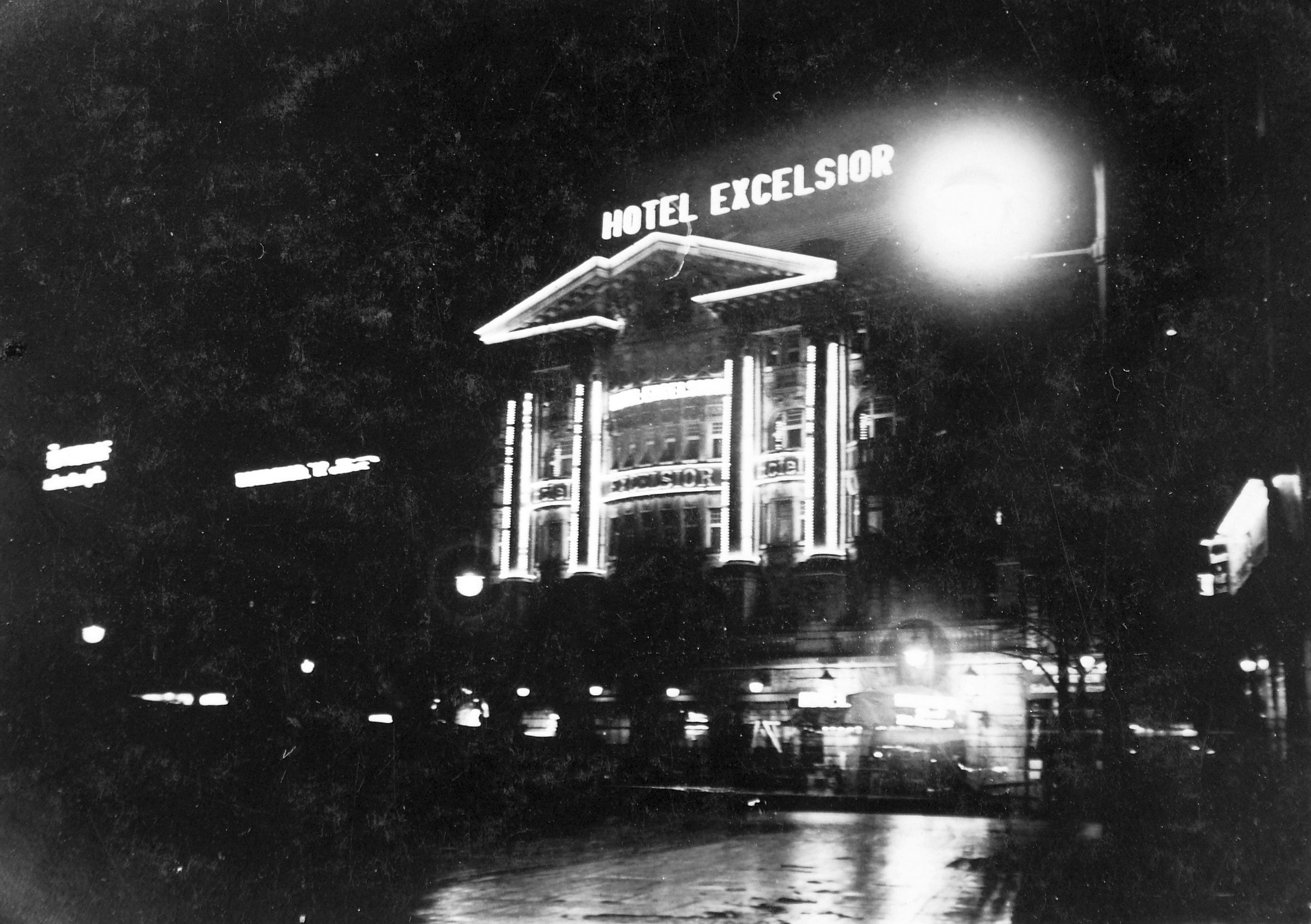 Hotel Excelsior. Location: Germany, Berlin Tags: neon sign Title: Hotel Excelsior.